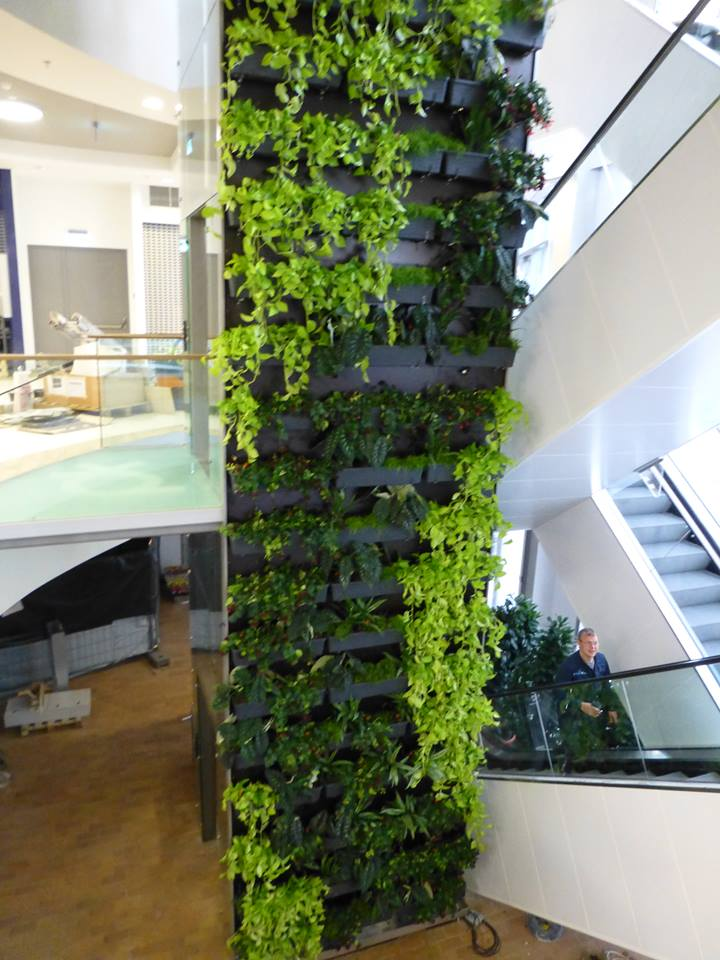 Maia Noorsalu taimevaip Tartus Lõunakeskuses